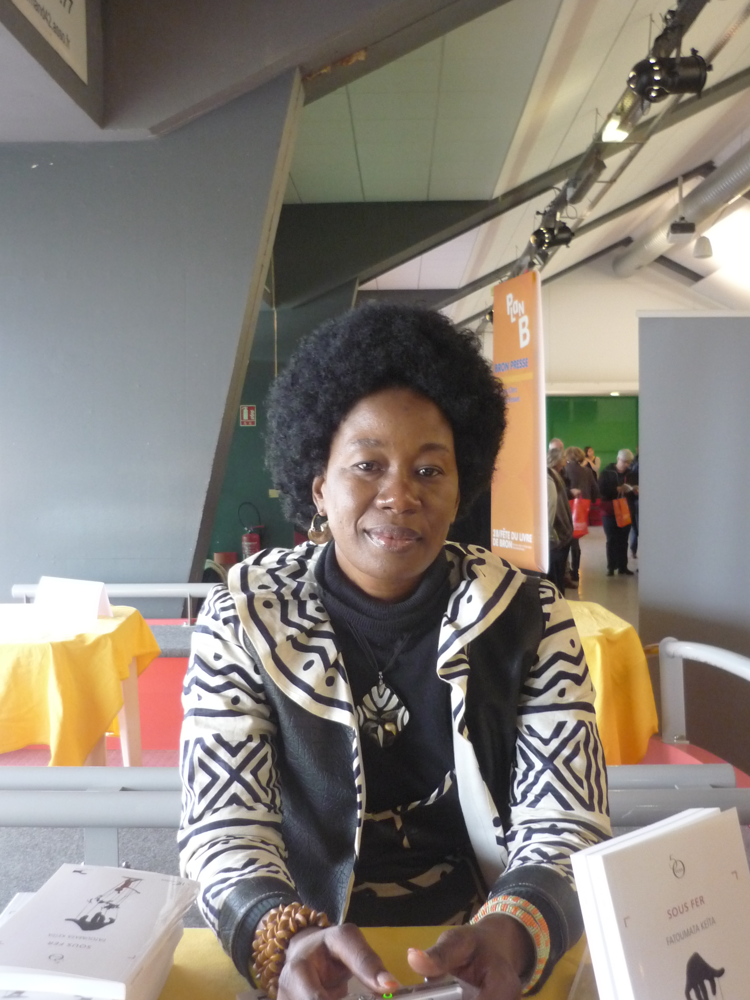 Portrait de l'écrivaine malienne Fatoumata Keita.